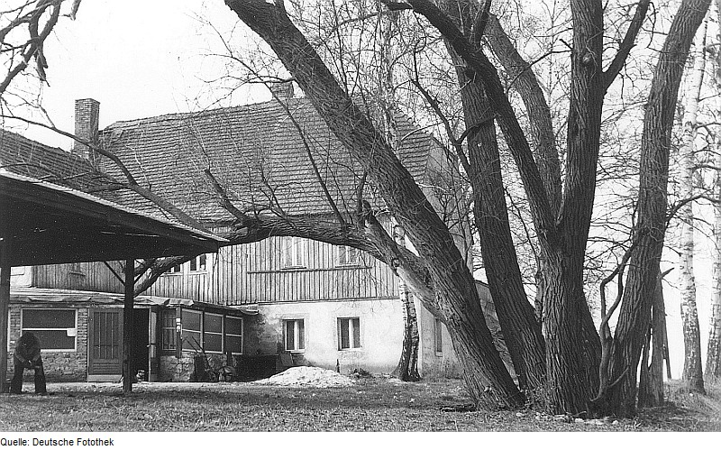 Original image description from the Deutsche Fotothek Dresden-Gohlis. Gohliser Windmühle, Gaststätte zur Windmühle